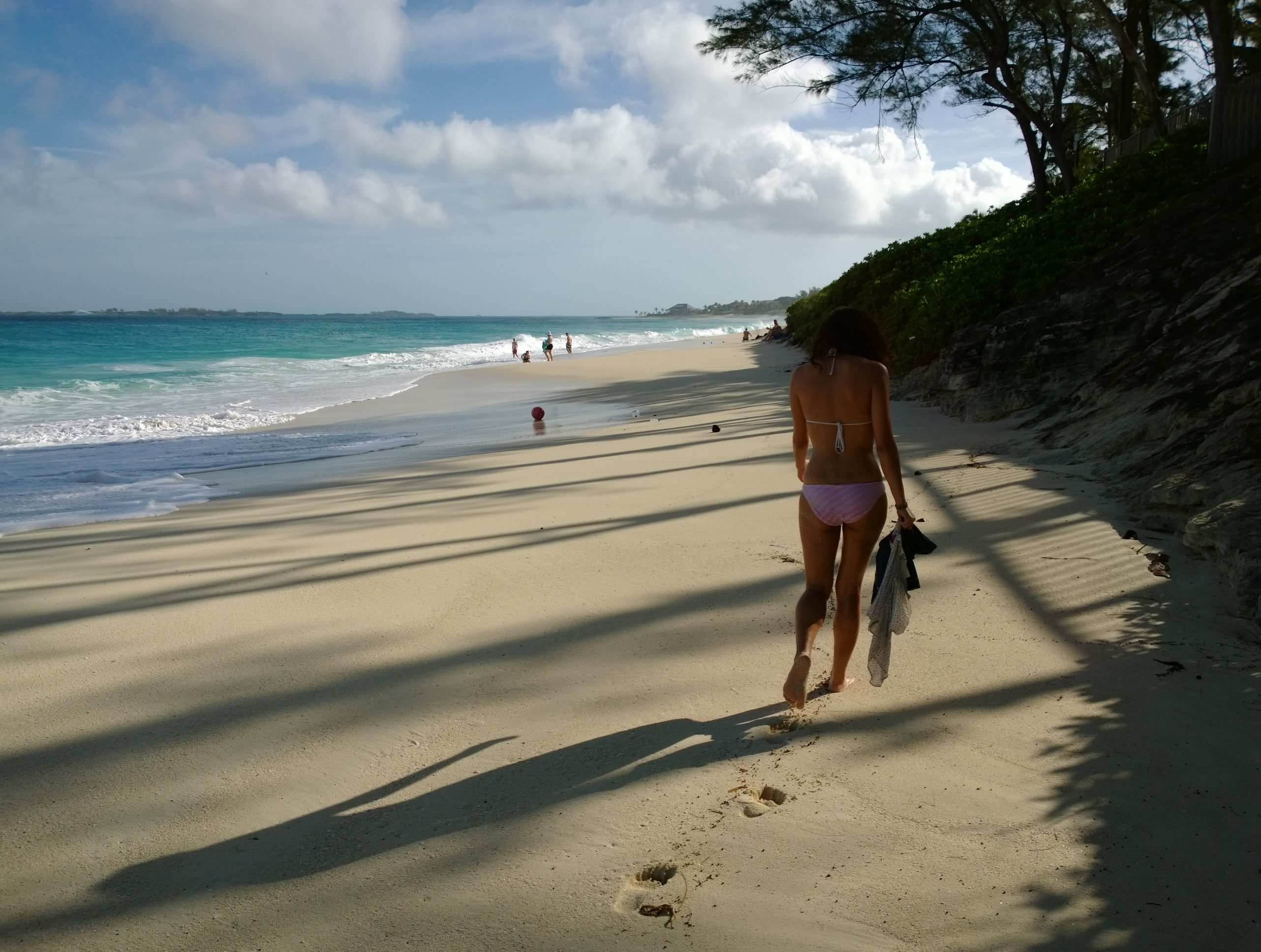 Selbst im Januar ist das Meer um die Insel New Providence noch 24 Grad warm.